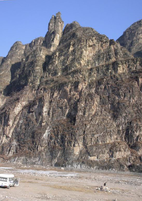 十渡，摄于十渡，自己拍，本图片不允许百度百科使用